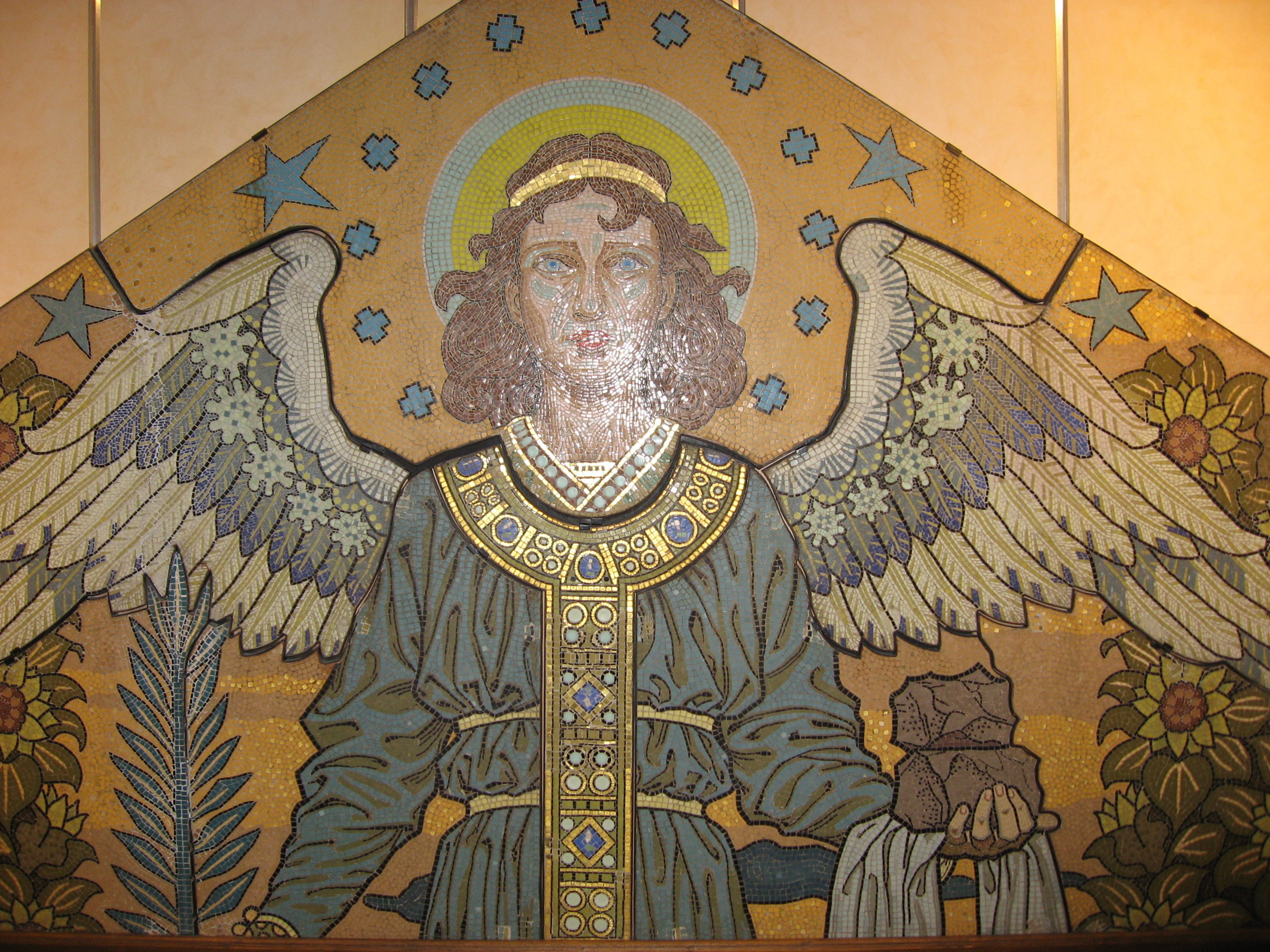 Détail des mosaïques émaux de Briare de l'église Saint-Étienne de Briare.